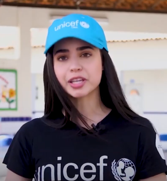 Sofia Carson in a mesage for Unicef in Brazil in 2019